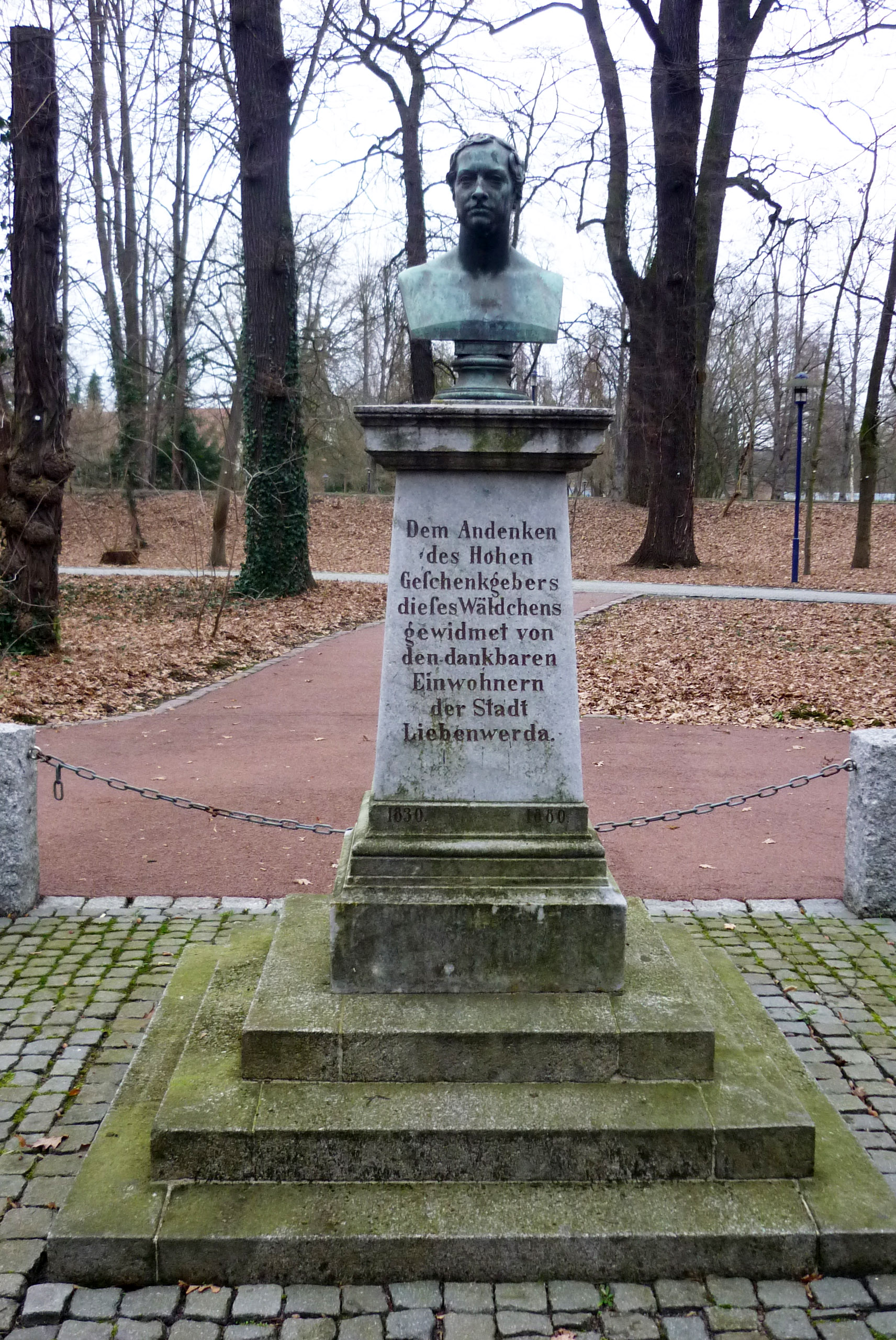 Denkmal König Friedrich Wilhelm III. im Kurpark in Bad Liebenwerda